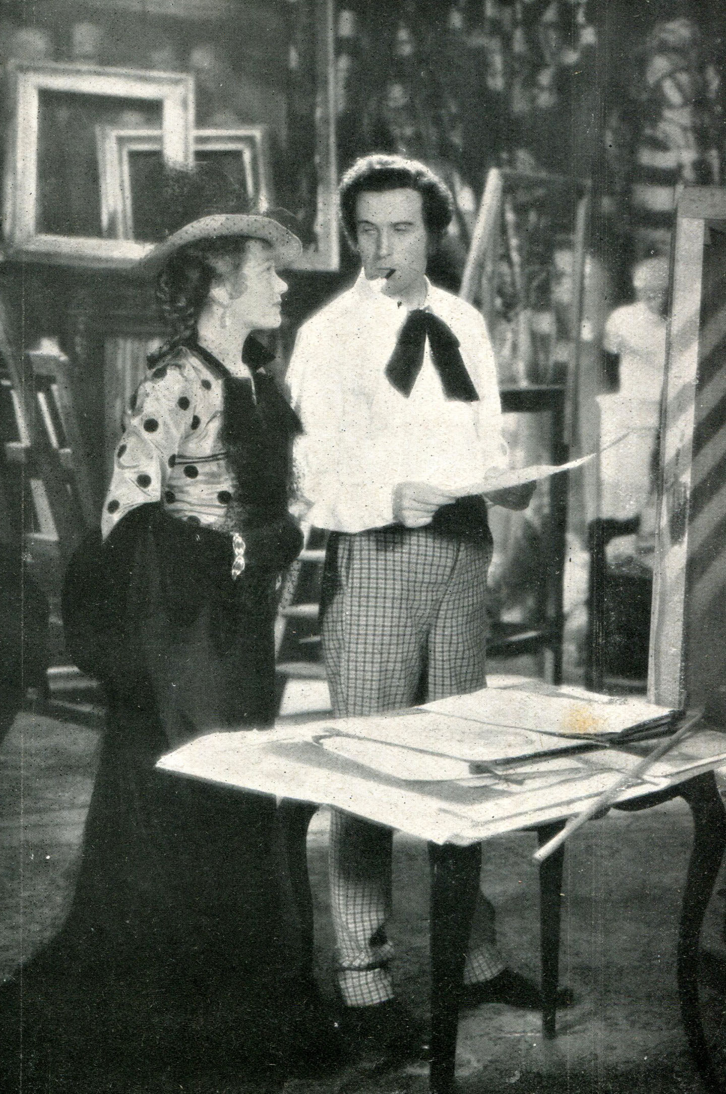 Isa Miranda ed Ennio Cerlesi in Il diario di una donna amata (Maria Baschkirtseff) - regia di Hermann Kosterlitz - produz Astra Film - Tobis Vienna - 1936